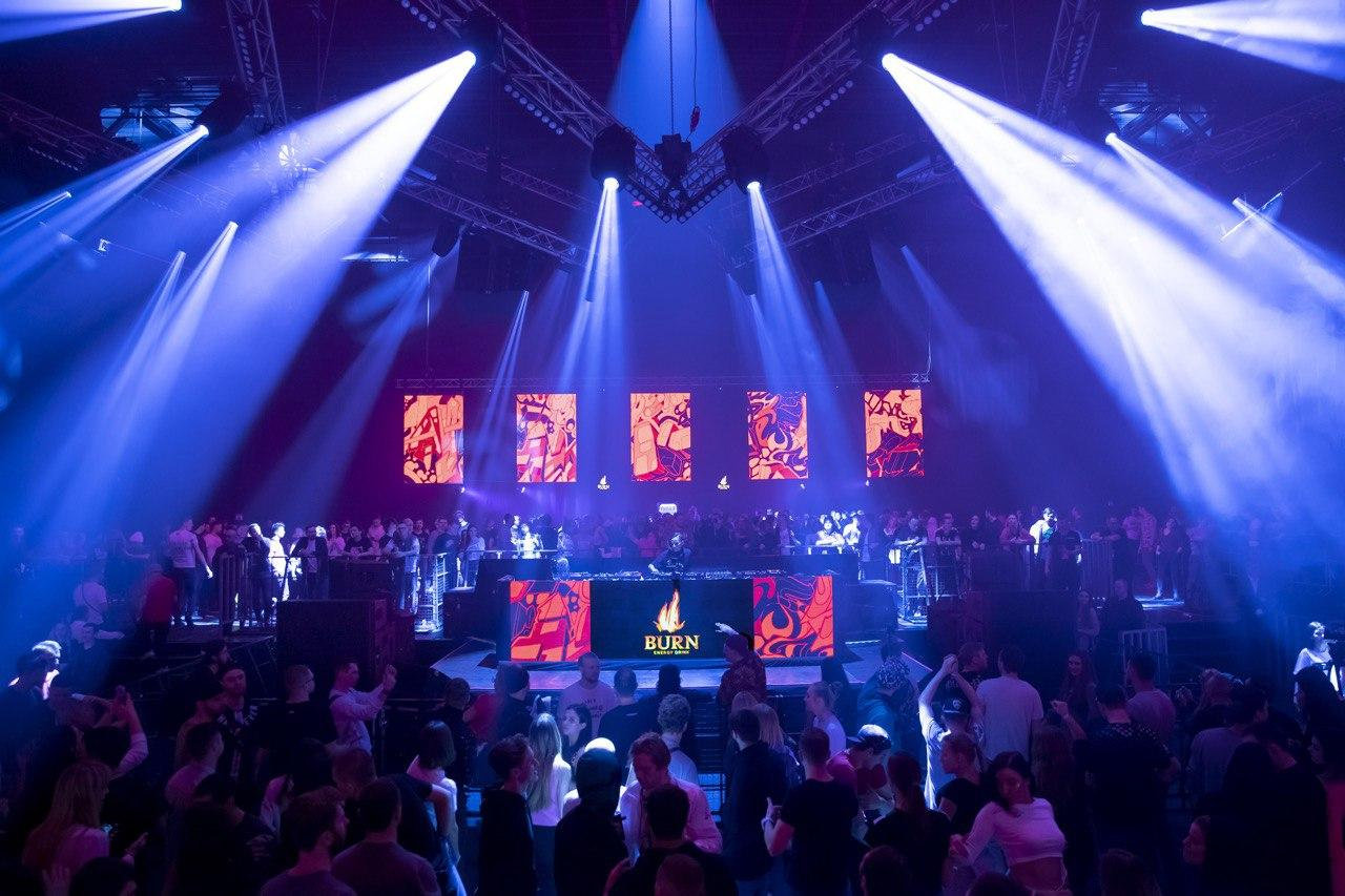 Снимок с мероприятия Alfa Future People Snow Edition 2020